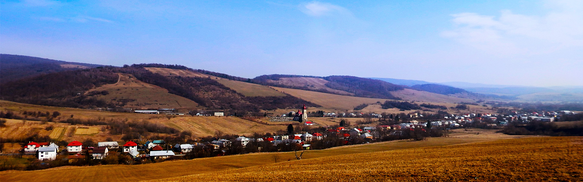 Panoráma obce Čertižné